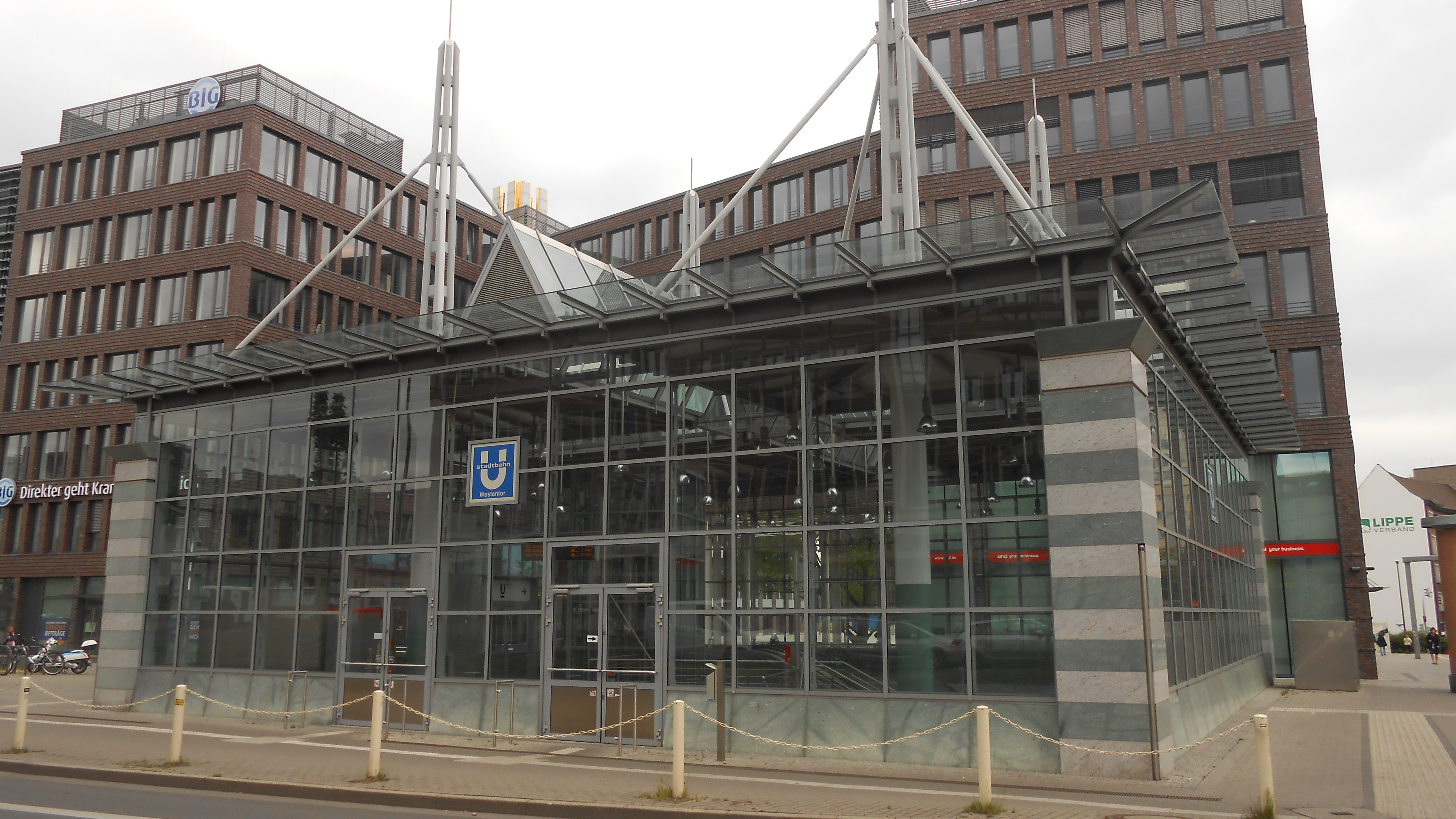 Eingang am Dortmunder U (Rheinische Straße) zum U-Bahnhof Westentor der Dortmunder Stadtbahnlinien U43 und U44.